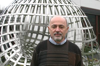 Foto di Vladimir Berkovich